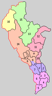 兵庫県川辺郡の町村制時点の町村。